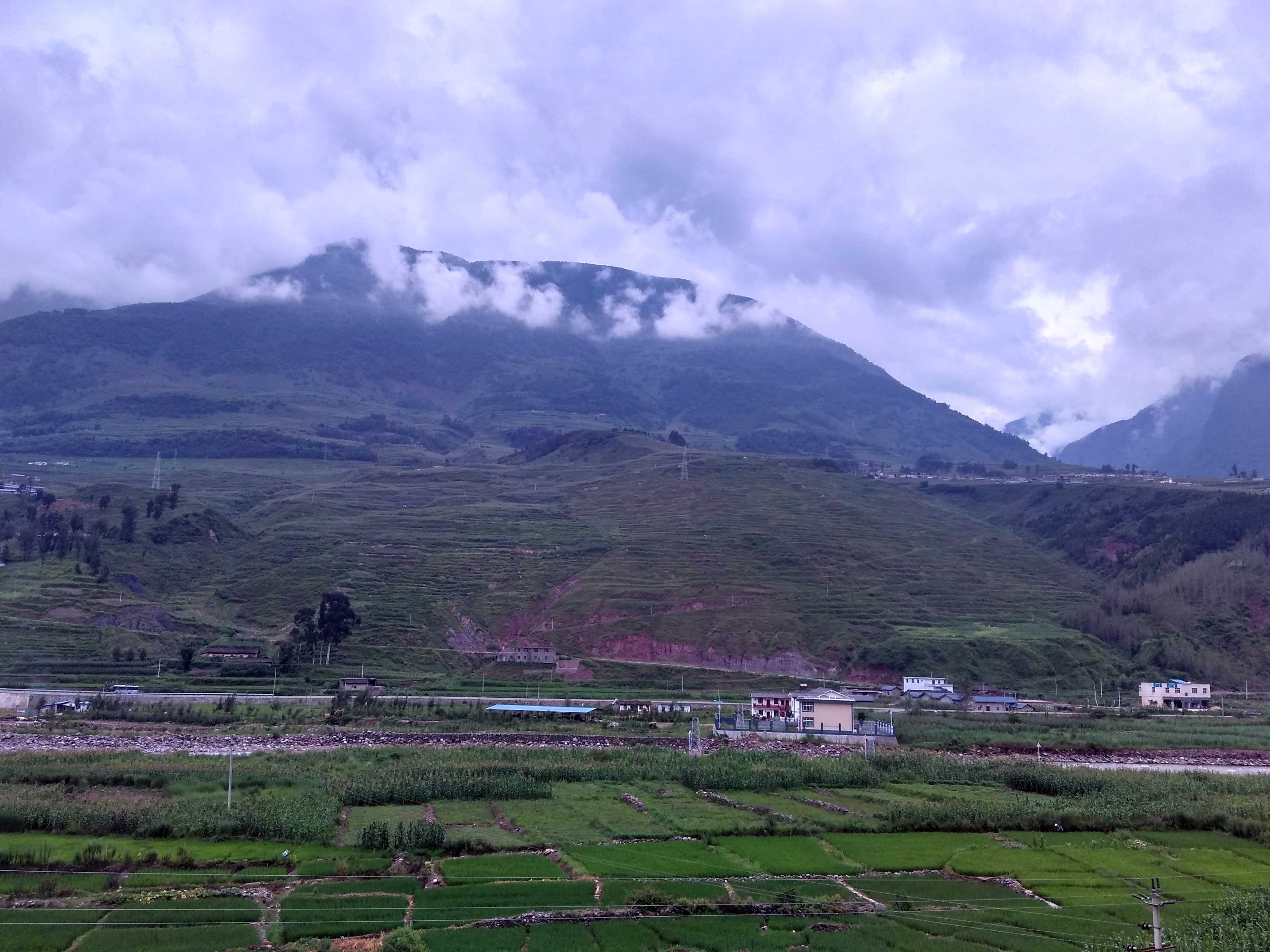 荞窝镇风景